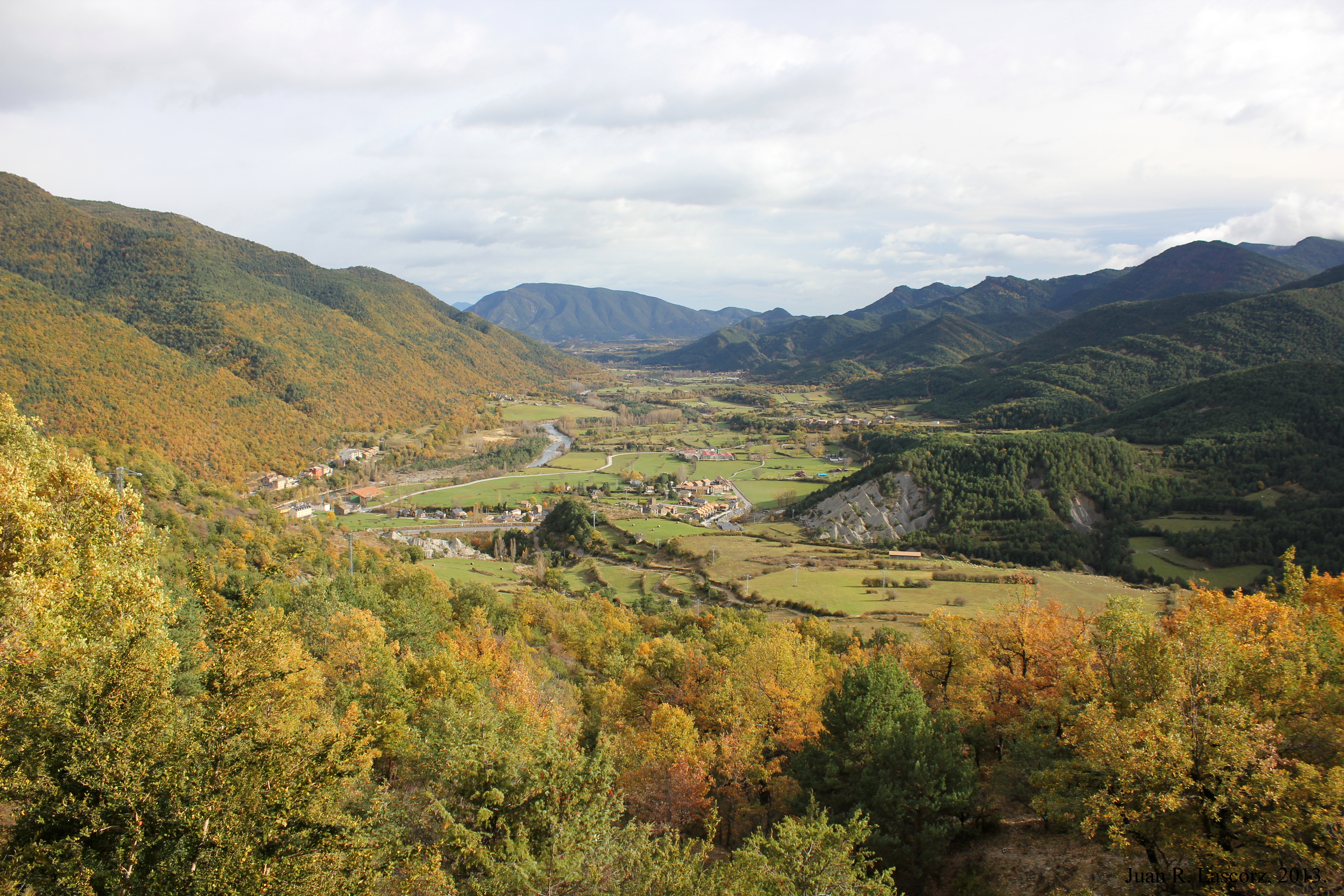 Aragonés: A Ribera de Fiscal dende a puyada de Lardiés ta Berroy.